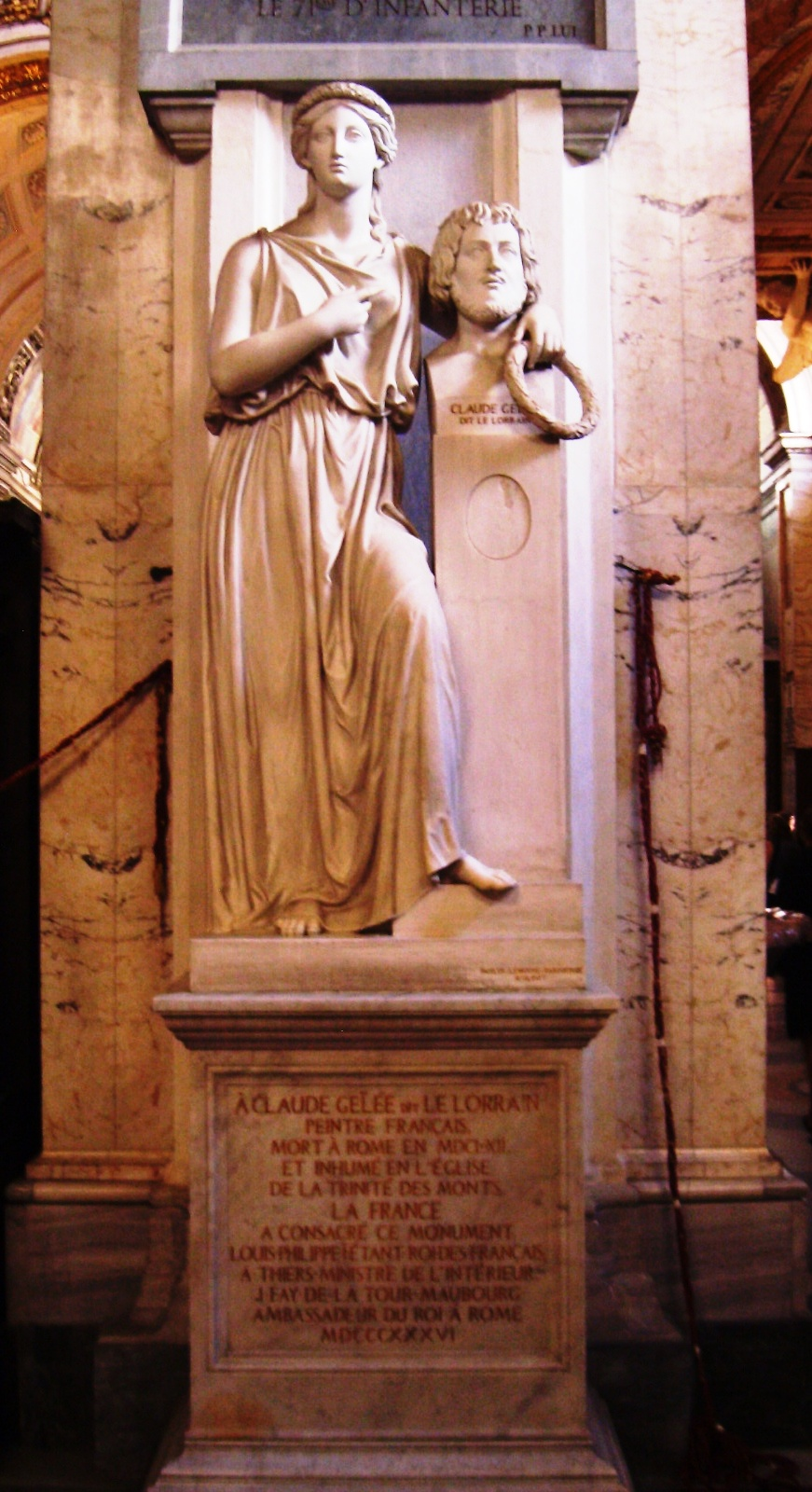 La sèpulture de Claude Gellée à Rome